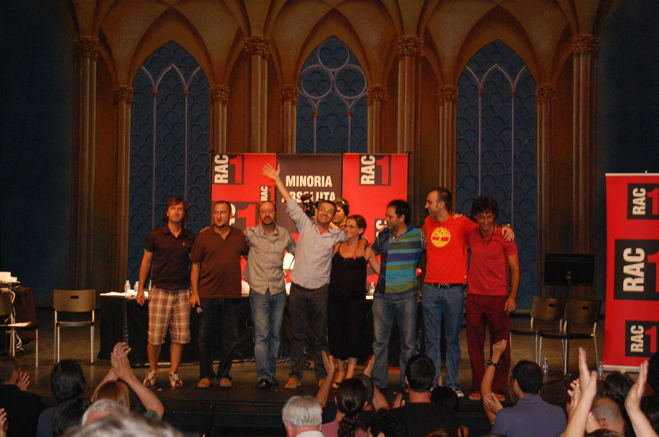 ULTIM PROGRAMA MINORIA ABSOLUTA - TIVOLI JUL 09. Des d'esquerre: Jordi Ríos, Toni Soler, Manel Lucas, Queco Novell, Mireia Portas, Cesc Casanovas, Quim Morales i Bruno Oro.